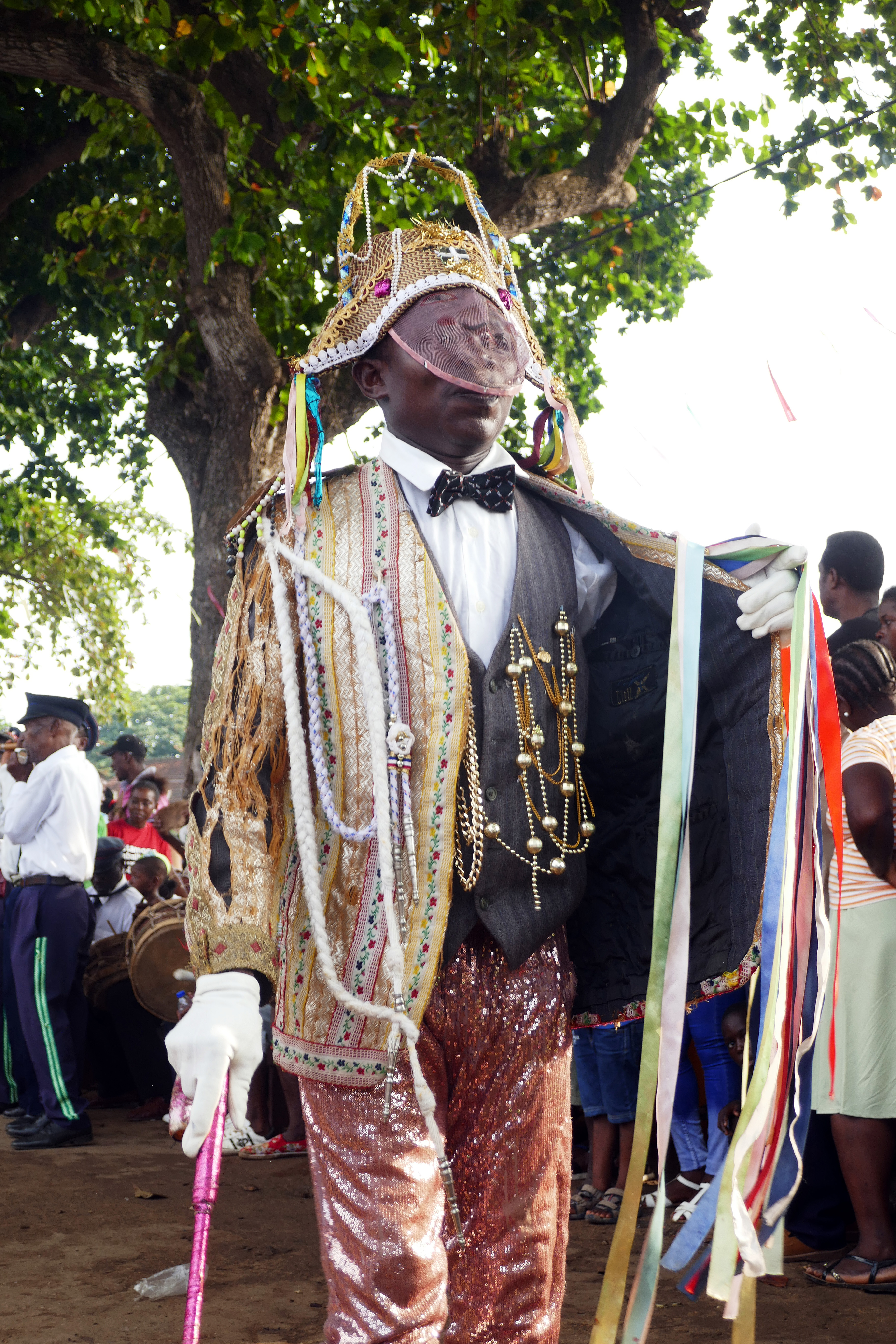 Tchiloli représenté devant l'église São Pedrão de São Tomé à l'occasion de la fête patronale. Le tchiloli est une forme théâtrale, musicale et dansée créée au XVIe siècle, jouée par des pêcheurs et des paysans. Traditionnellement elle met en scène la seule pièce du répertoire, La tragédie du marquis de Mantoue et de l'empereur Charlemagne". This is an image with the theme "Play" from: Sao Tome and Principe